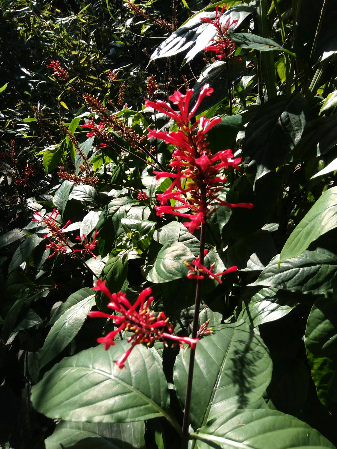 內湖白鷺鷥山上的紅樓花，攝於2018年1月